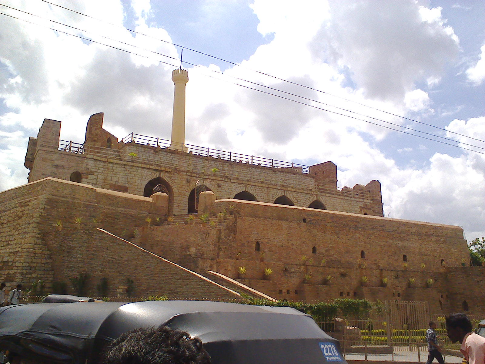 కొండారెడ్డి బురుజు